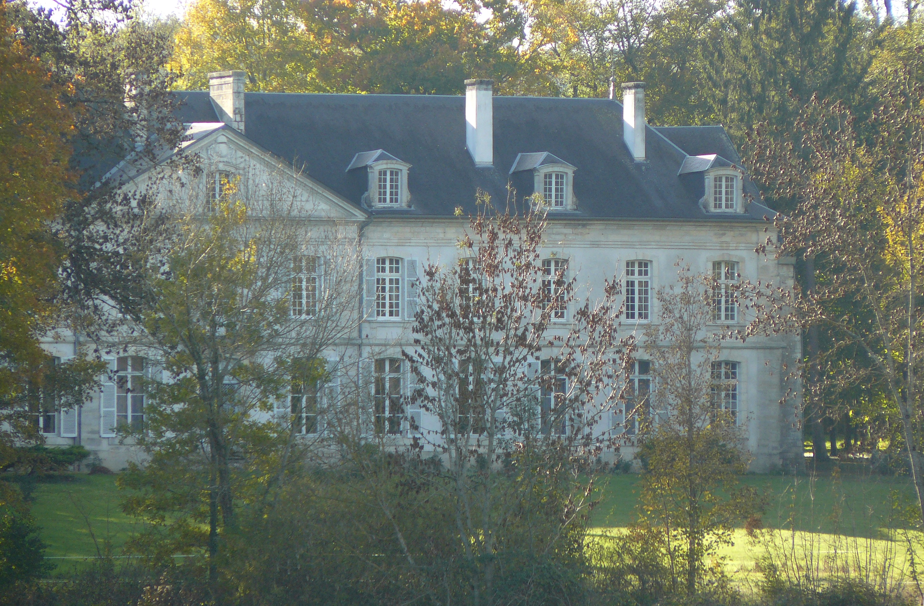 Pothières (Côte-D'Or, France) - Ancienne abbaye Pierre et Paul (détruite) - bâtiments conventuels du XVIIIe siècle (pavillon de l'abbé)